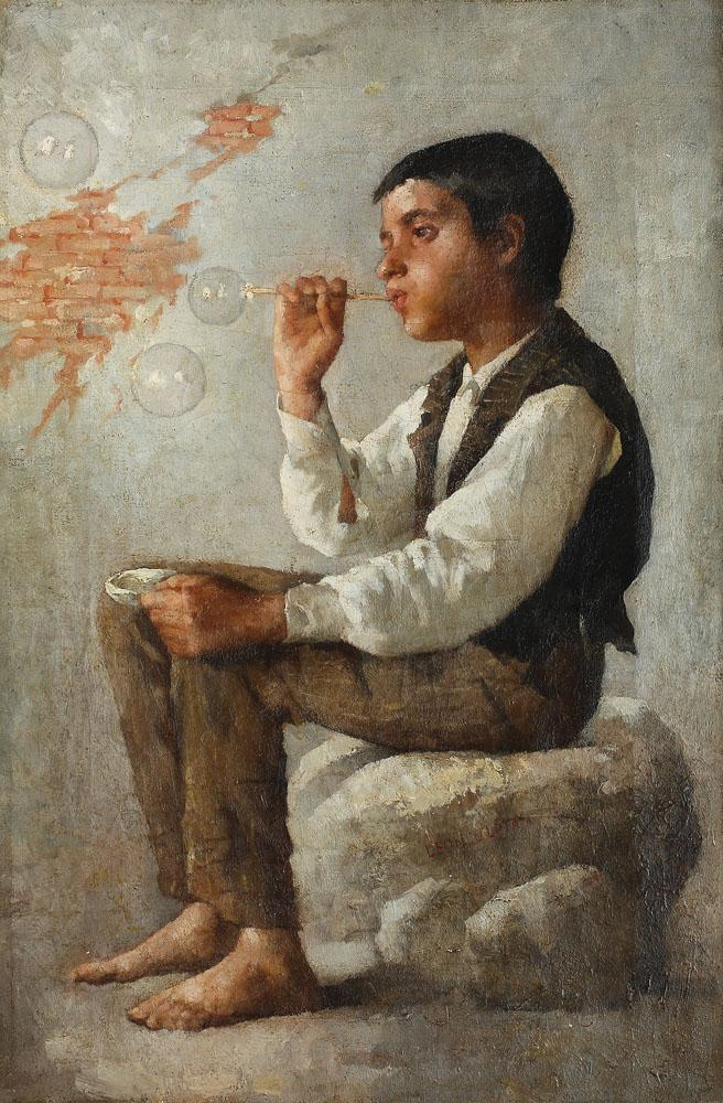 Nicolae Gropeanu (1865 - 1936) - Balonaşe, ulei pe pânză, 62x40,5 cm, semnat dreapta centru, cu brun, LEON ULPIAN.